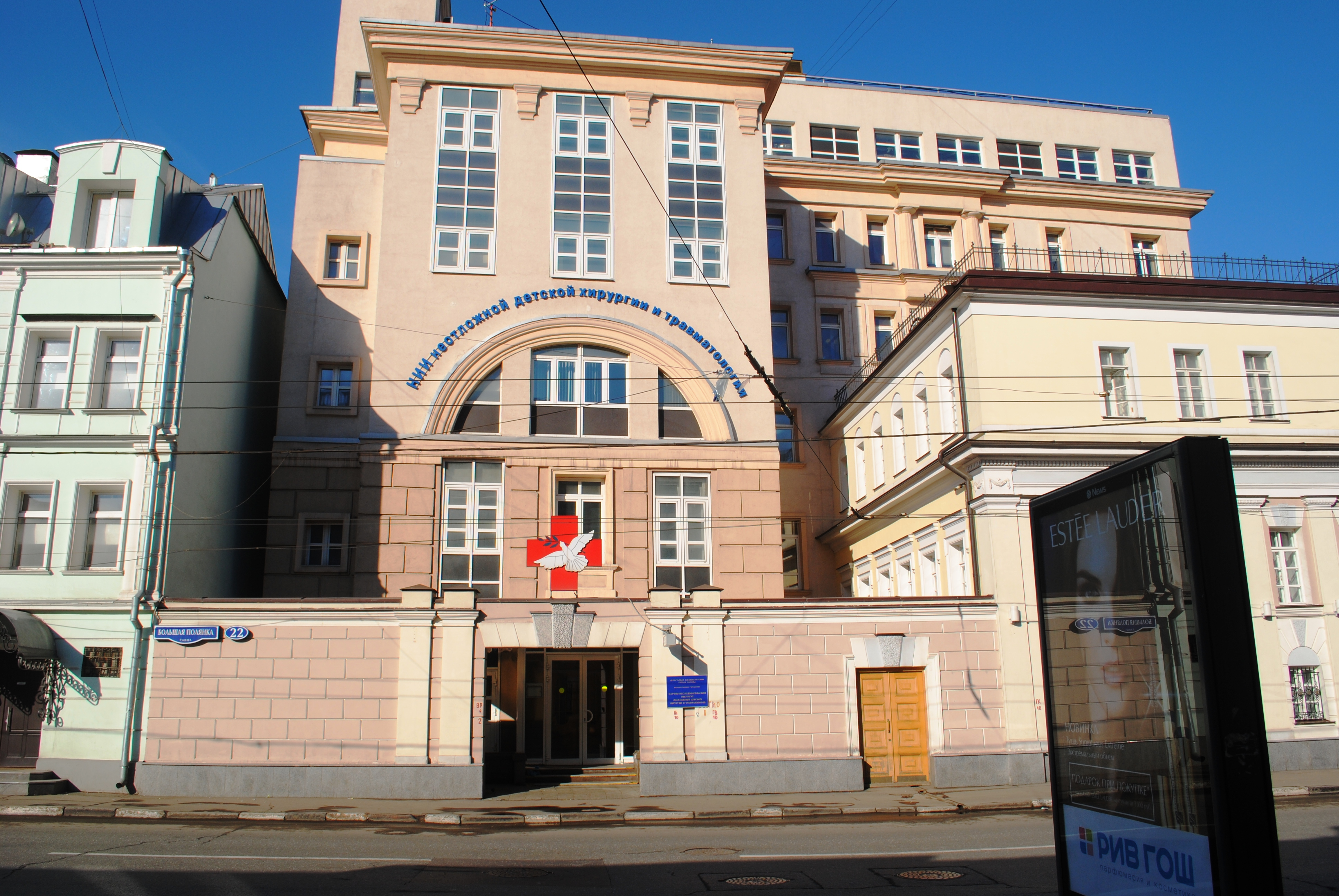 Москва, Большая Полянка, 22